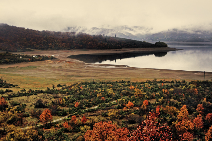 Мавровското езеро през есента, Република Македония.